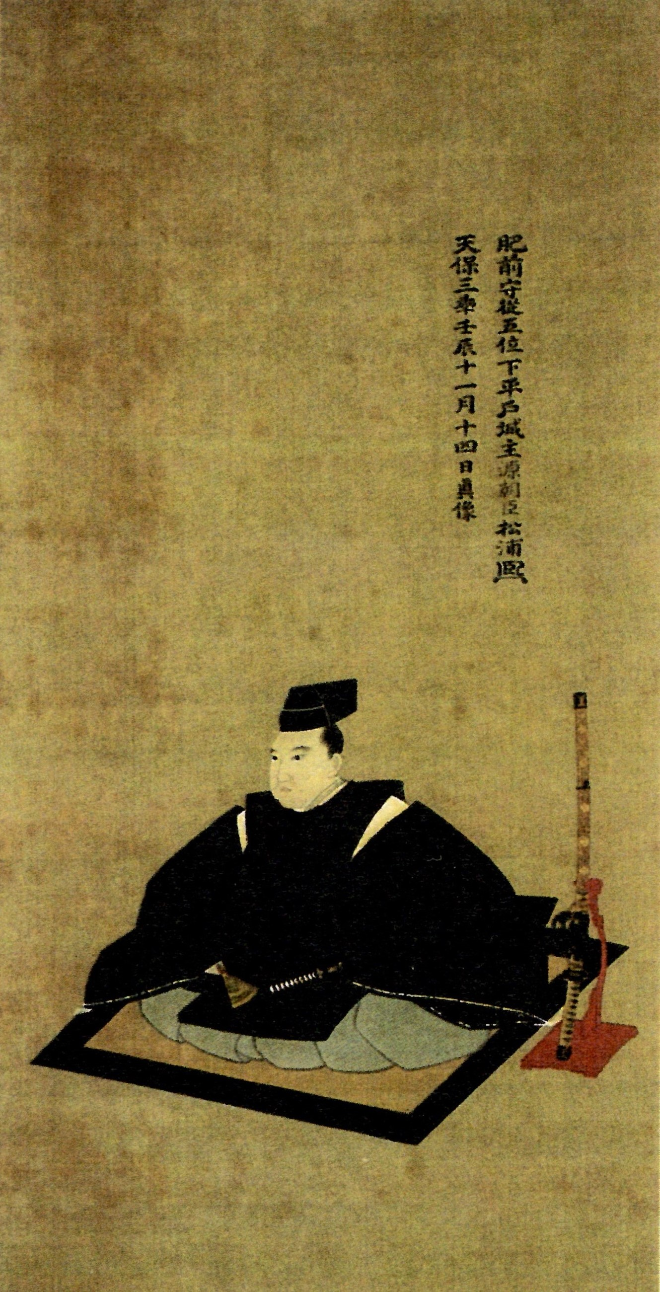 松浦熈の肖像。